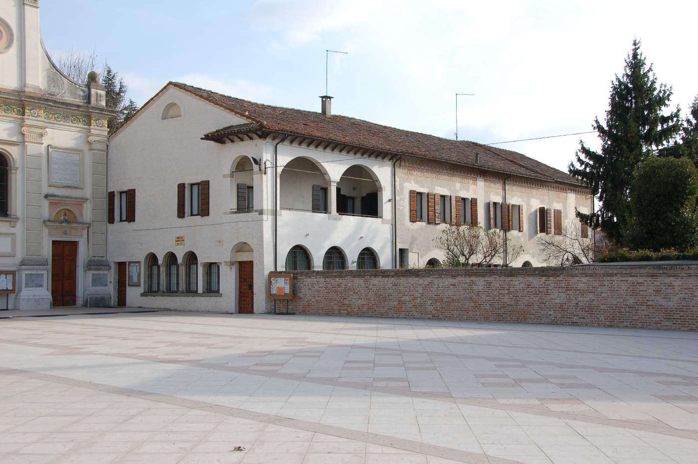 Fronte Ovest dell'Abbazia di Santa Maria di Mogliano del XI secolo. Al disotto del cornicione sono tuttora presenti tracce di affreschi con motivi floreali e geometrici.